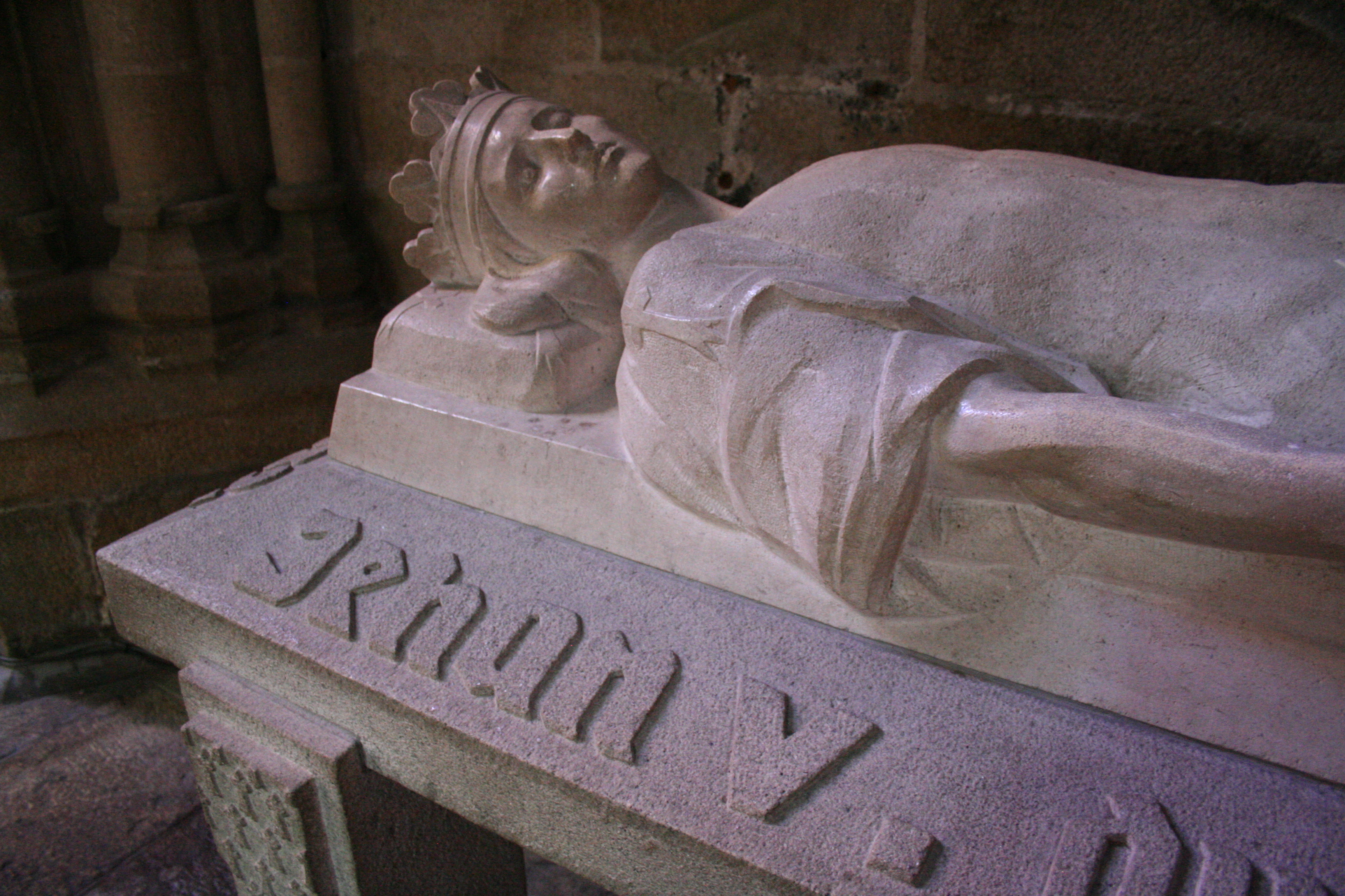 Cathédrale Saint-Tugdual de Tréguier - Tréguier - Côtes d'Armor - France .